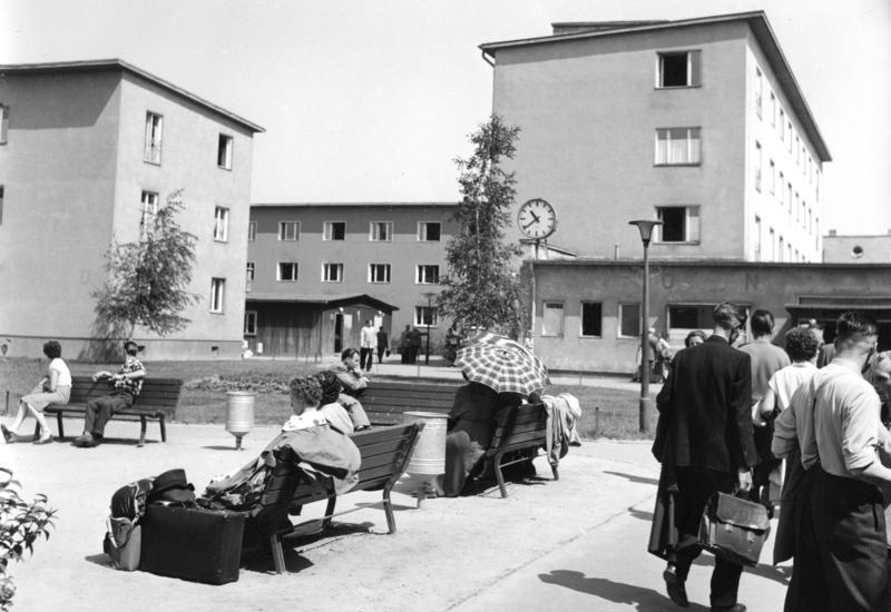 Juli 1958 Flüchtlingslager Marienfelde